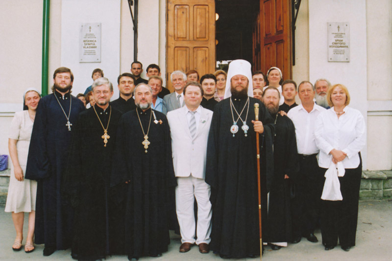 Church of St. Volodymyr (2002).